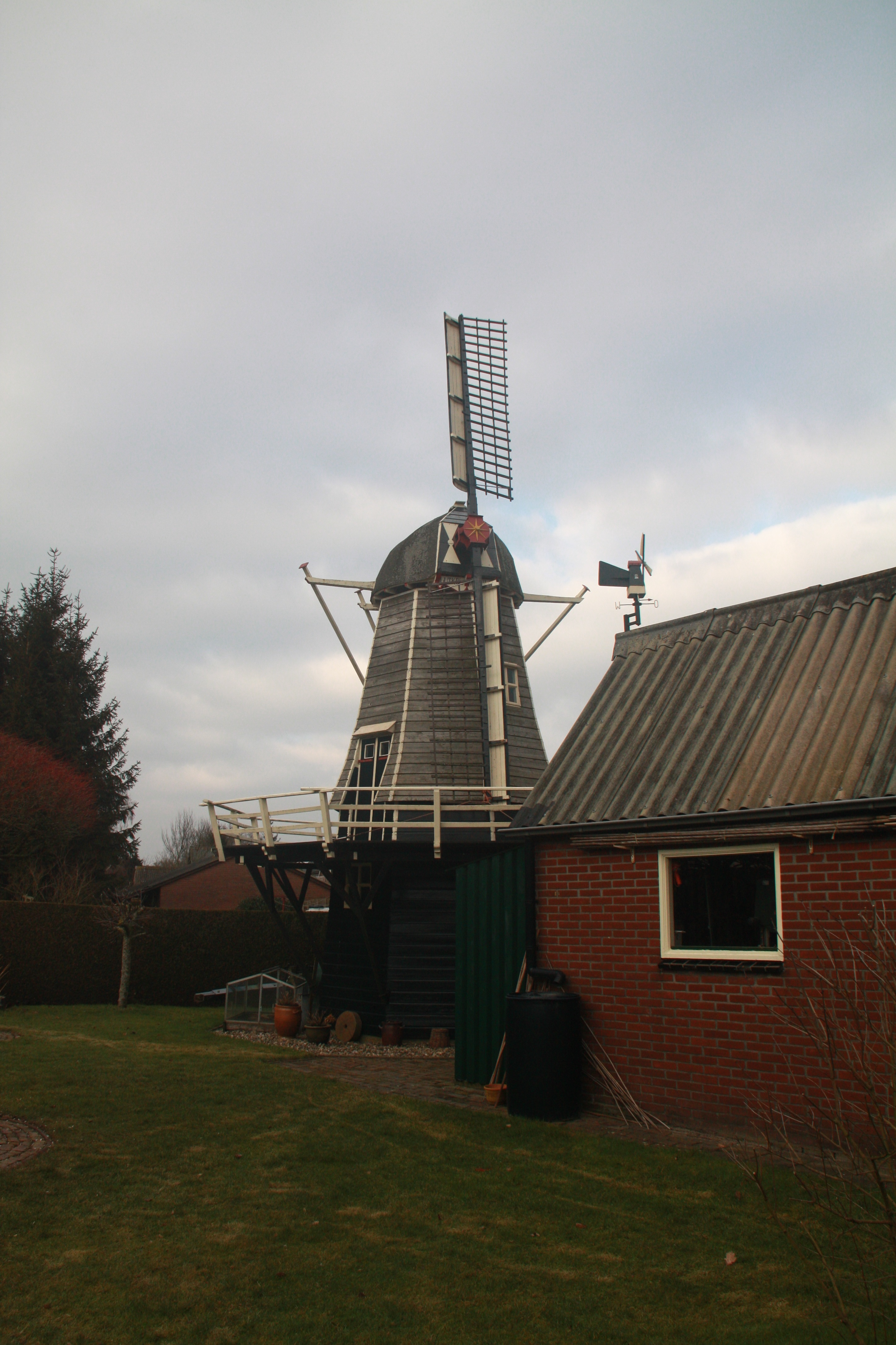 Lutke's Meule